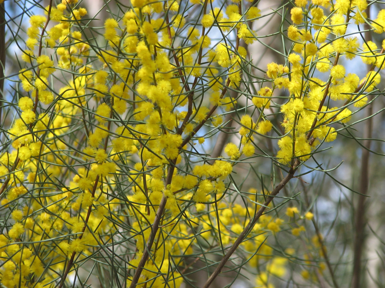 Acacia rigens (cultivated, labelled), Maranoa Gardens, Balwyn, Victoria, Australia